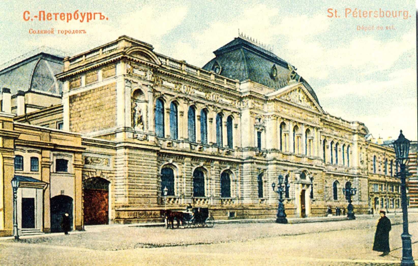 Месмахер Максимилиан Егорович (1842 -1906) Училище барона Штиглица в Соляном городке.